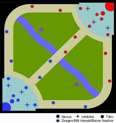 Summoner's Rift arenaen i League of Legends, med blå base nederst til venstre, rød base øverst til høyre og de tre banene mellom. Elven deler banen i en blå og en rød halvdel. Jungelen, her vist i grønt, er en labyrint befolket av jungelkryp, blant annet Dragen nede i blå halvdel og Rift Herald/Baron Nashor oppe i blå halvdel.